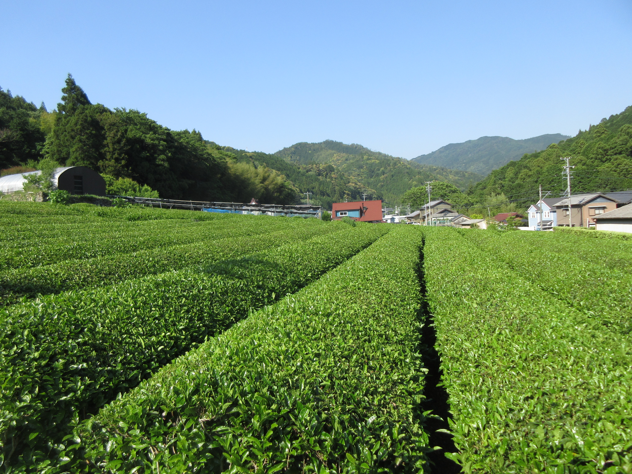 岡崎市石原町の茶畑